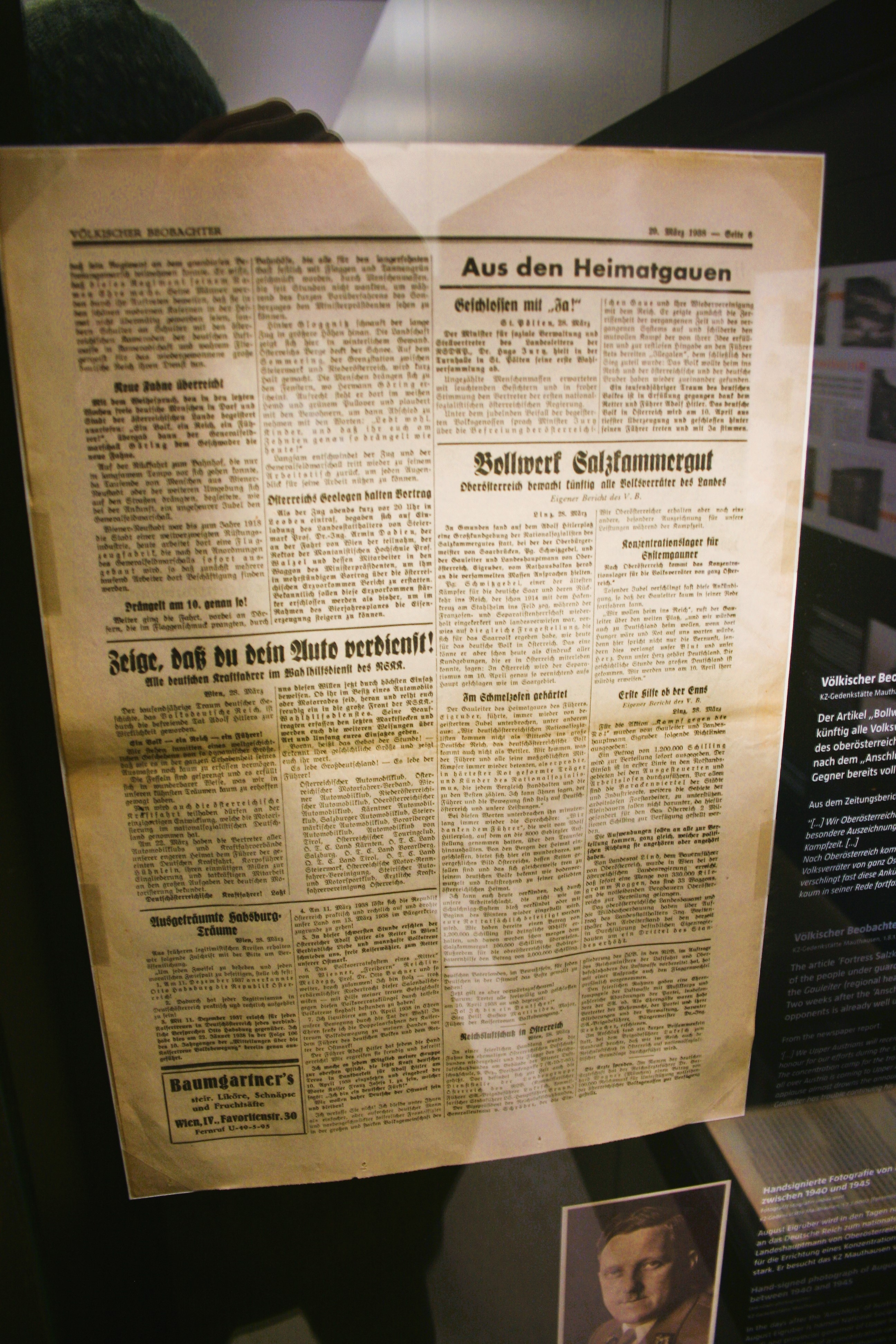 Ausgabe des Völkischen Beobachters vom 29.3.1938, zwei Wochen nach der Invasion, in Mauthausen.